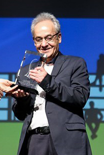 رضا عالمی در چهارمین سال نوای موسیقی ایران ۲ آذر ۱۳۹۷ فرهنگسرای نیاوران